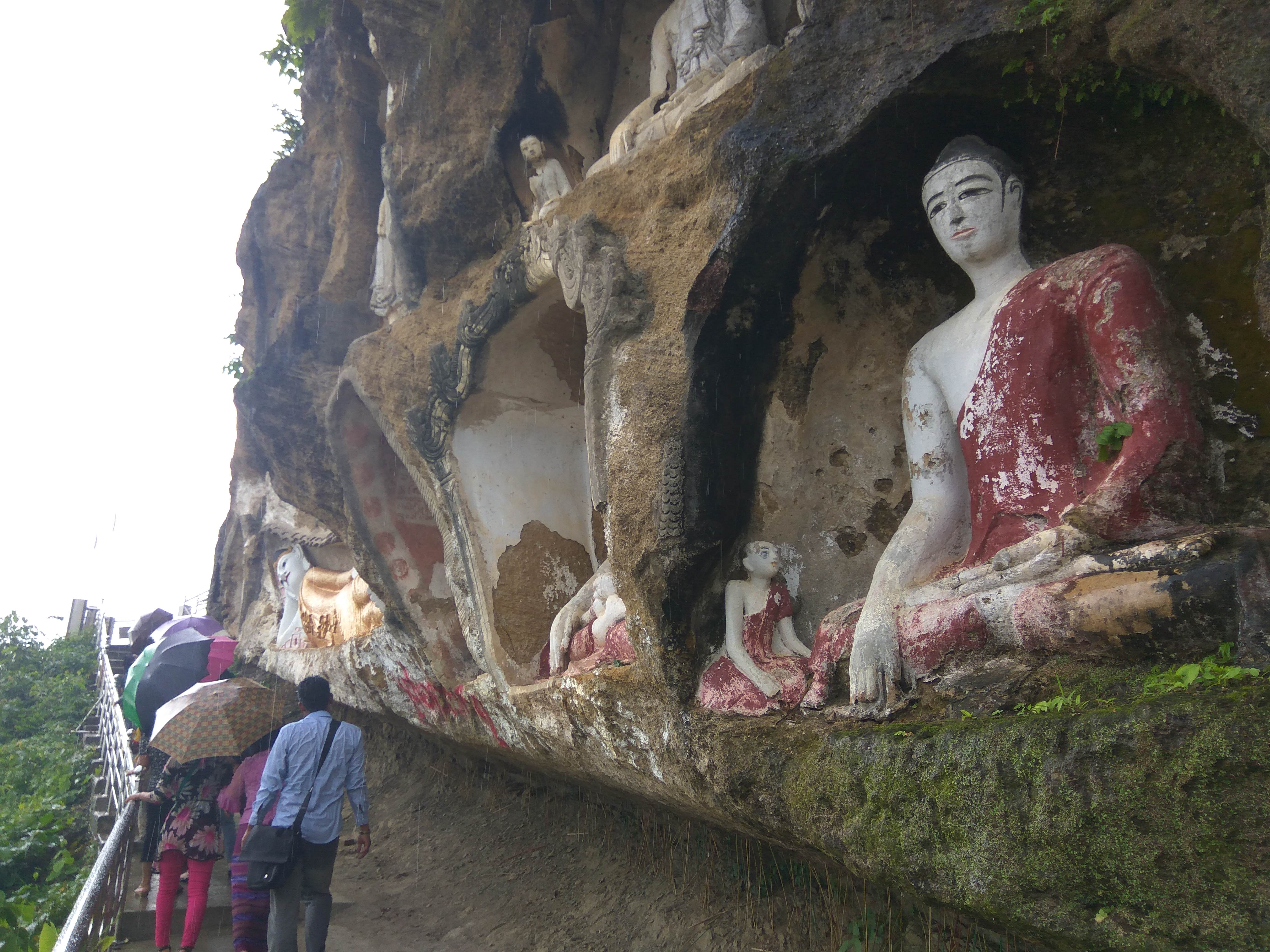 မြန်မာဘာသာ: အကောက်တောင်ပေါ်သို့ ဧရာဝတီမြစ်ကမ်းဘက်မှ တက်သည့်လမ်းတနေရာ